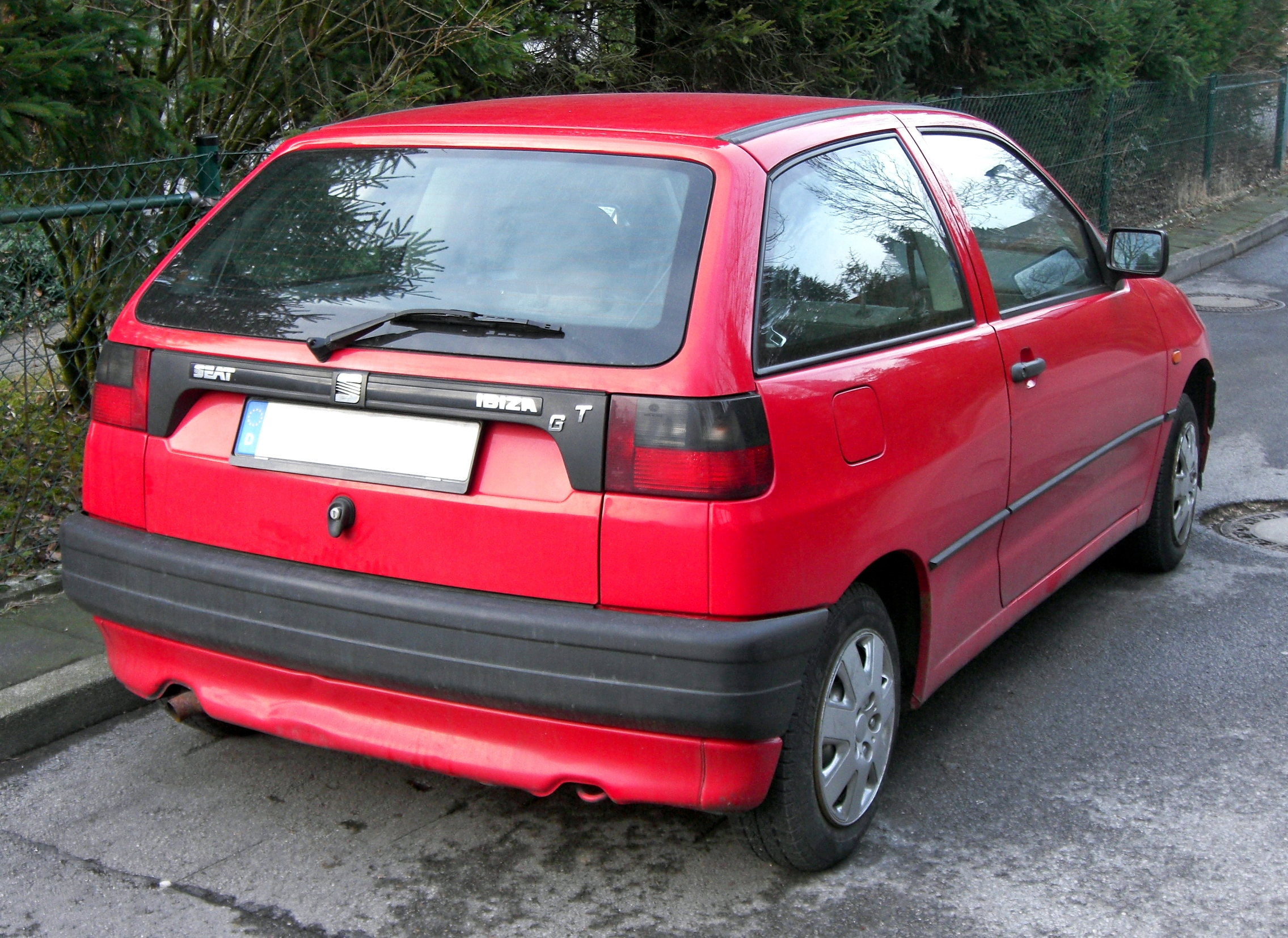 Seat Ibiza